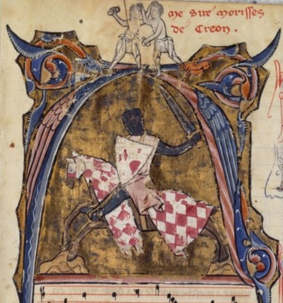 Maurice de Craon